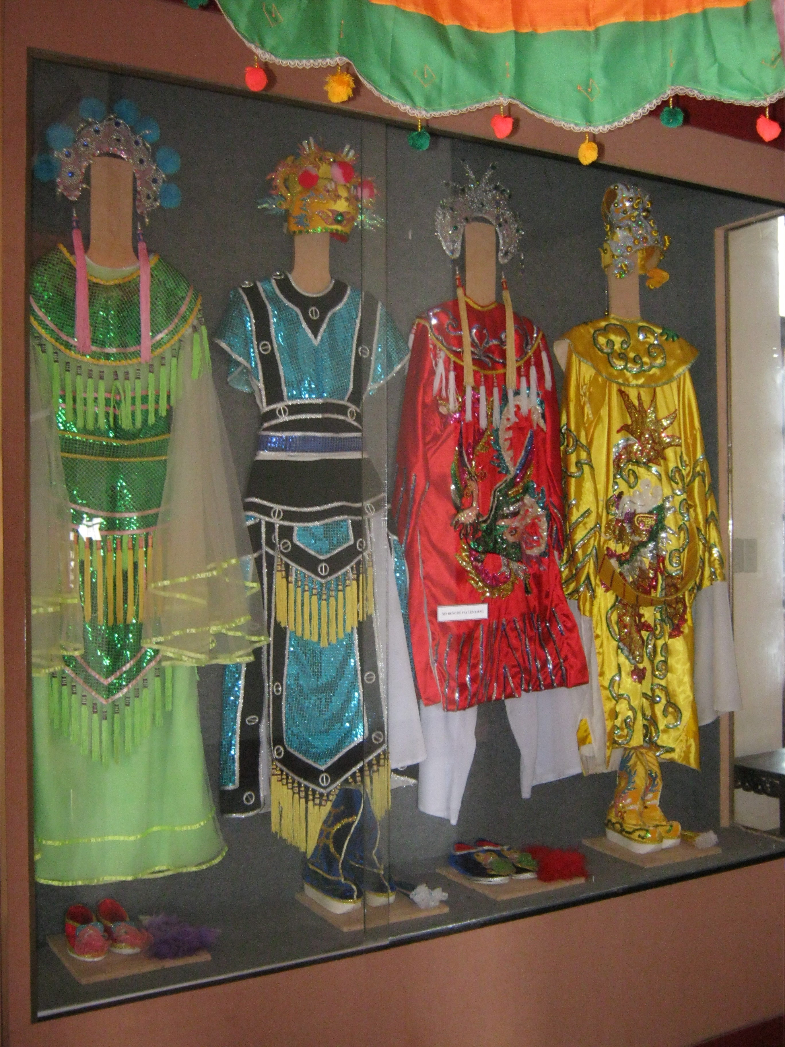 Y phục dùng trong các vở diễn về tuồng tích xưa tại Việt Nam, hiện đang trưng bày tại Bảo tàng Vĩnh Long